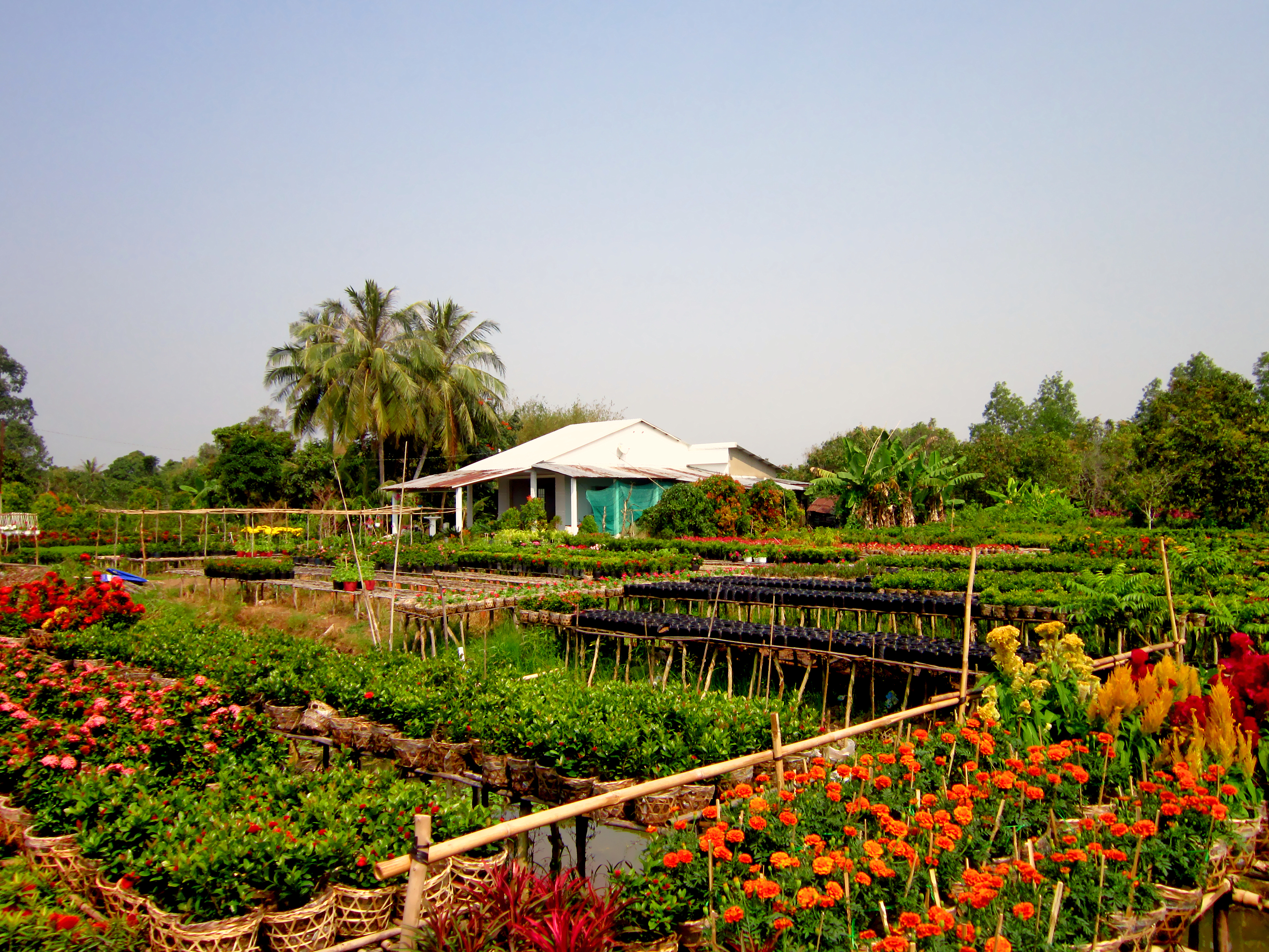 Phong cảnh tại một khu vực chuyên trồng hoa ở Tân Quy Đông, thuộc thành phố Sa Đéc, tỉnh Đồng Tháp, Việt Nam.